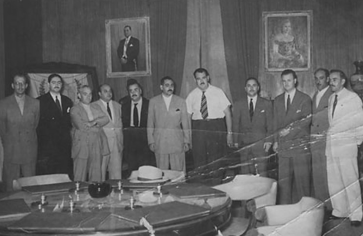 Raúl Lucini con miembros de Luz y Fuerza entre 1952 y 1955